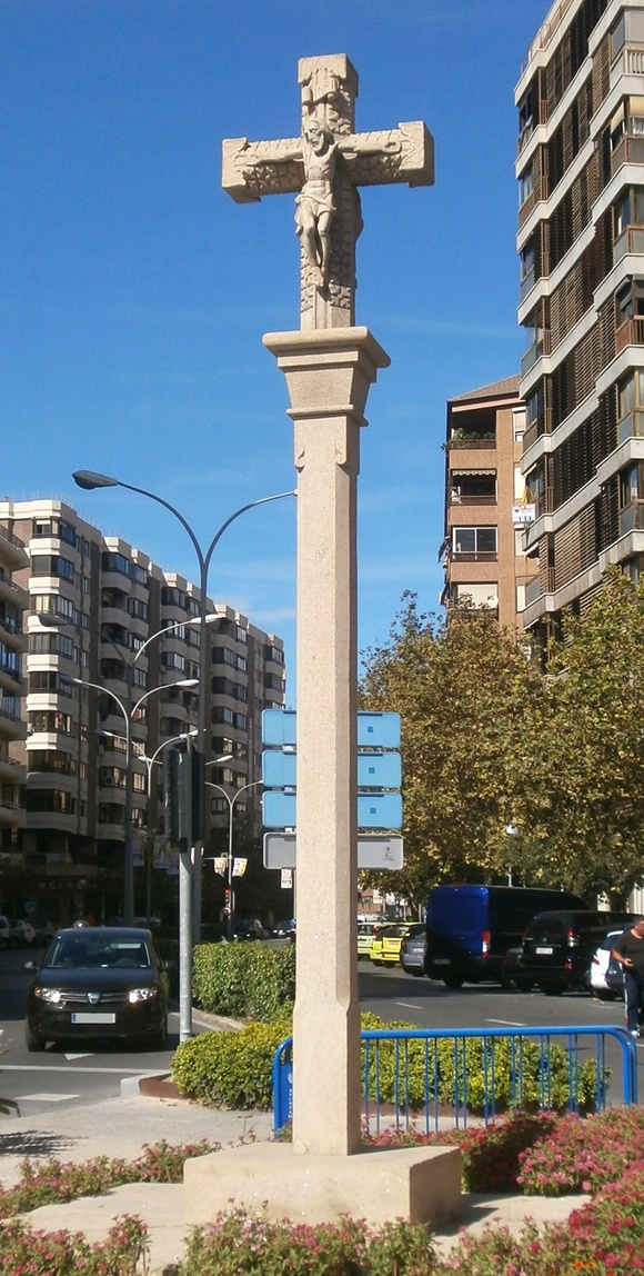 Cruceiro en la av. Eusebio Sempere, junto a la plaza Galicia, Alicante, España. Obra realizada por Raúl Comesaña Covelo. Donada por las cuatro diputaciones provinciales gallegas a la ciudad de Alicante con motivo de la dedicación de una plaza a Galicia y una calle a Orense en 1971.